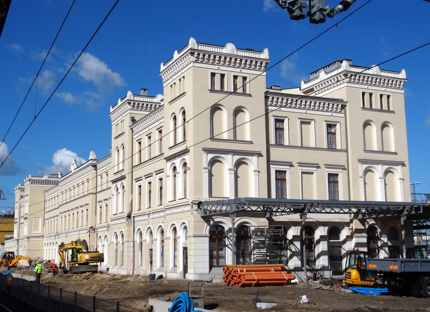 Dworzec kolejowy Bydgoszcz Główna. Odrestaurowany w 2015 r. budynek dworca wyspowego (1851, 1861)